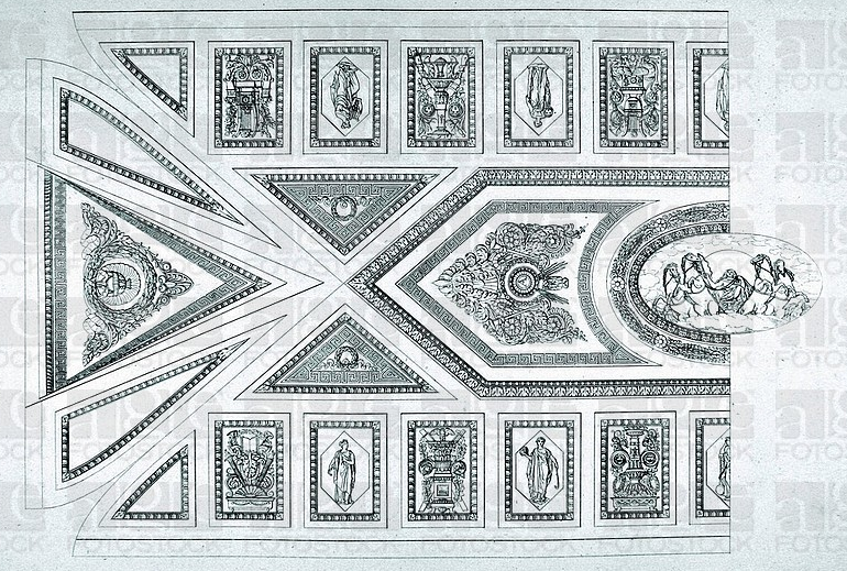 Entwurfszeichnung für eine Decke für die Accademia in Brera, Tafel 19 aus der Raccolta di compartimenti e d'oernati